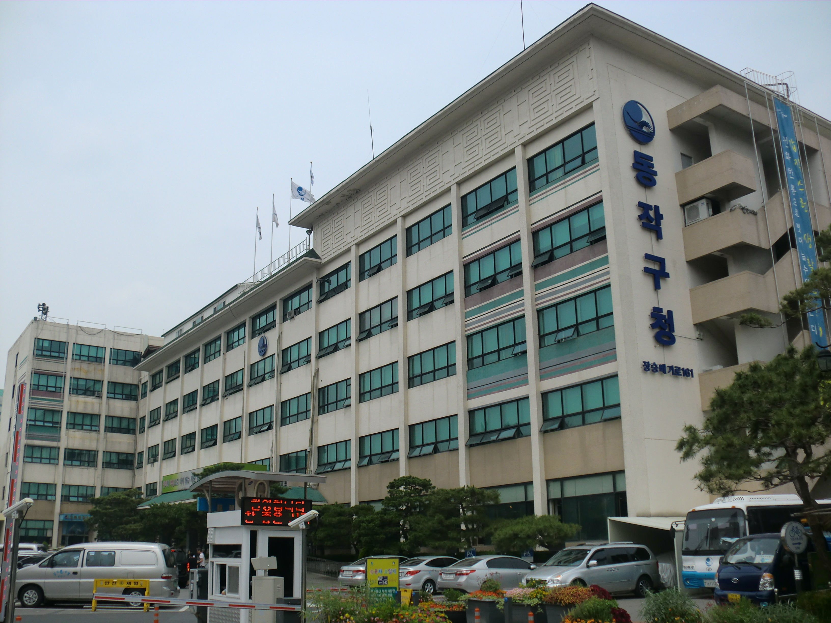 서울특별시 동작구에 있는 동작구청